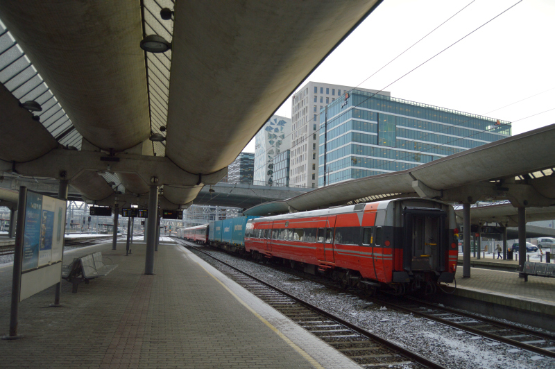 Prøvekjøringstog Oslo S.